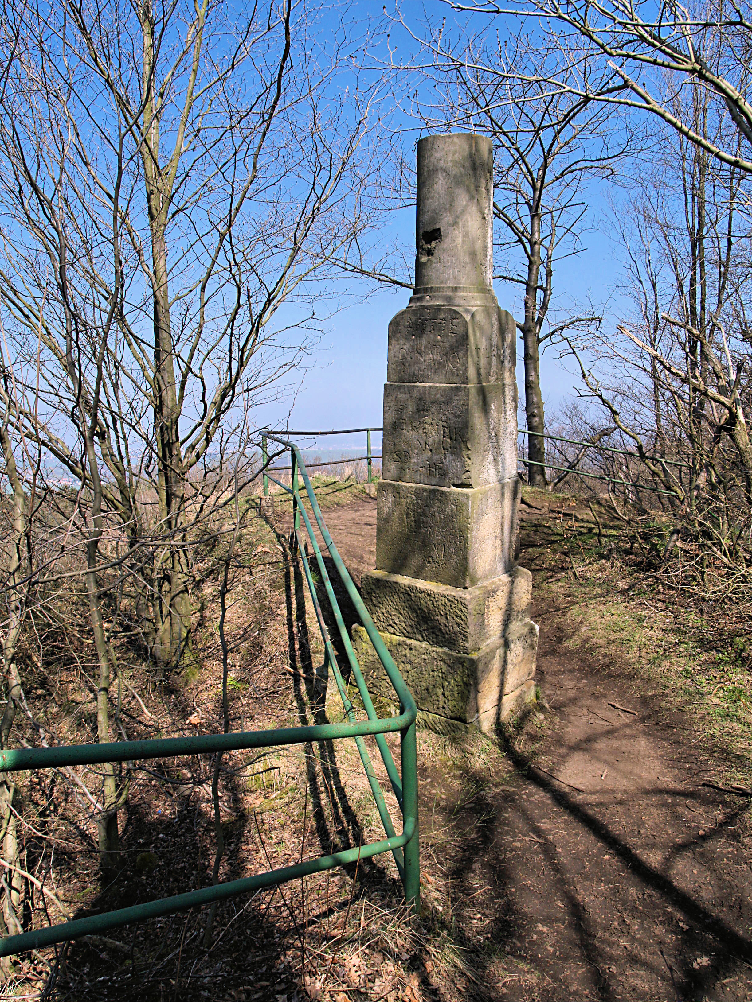 Station Nr. 61 Wilisch, 2. Ordnung der Königlich-Sächsischen Triangulierung auf dem Wilisch bei Kreischa